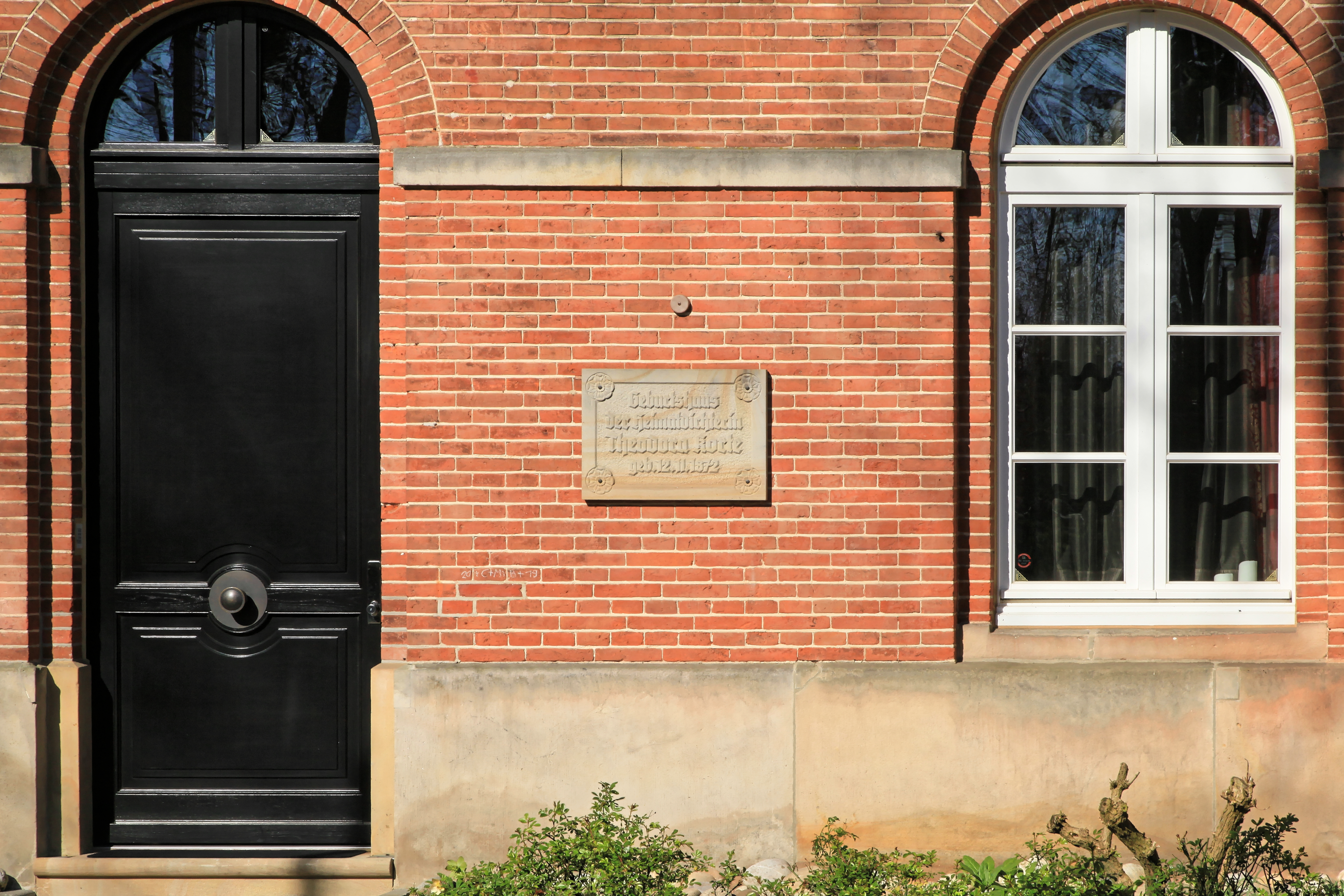 Amtshaus Nienhaus, Meppener Straße (B70) in Aschendorf, Papenburg